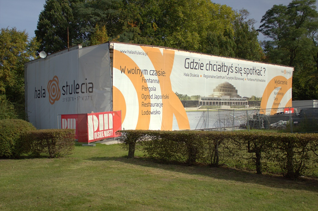 Budynek dawnego sanatorium w roku 2013